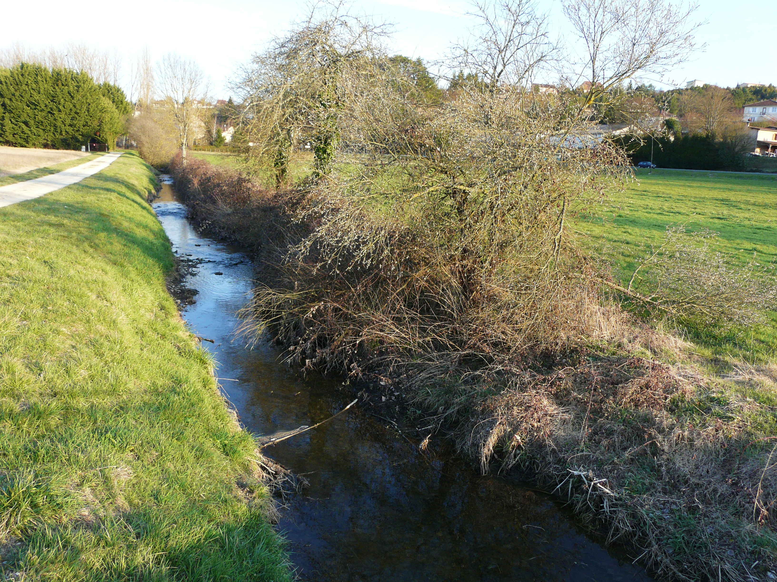 Le Manoire à l'ouest du bourg de Saint-Pierre-de-Chignac, Dordogne, France. Vue vers l'amont.